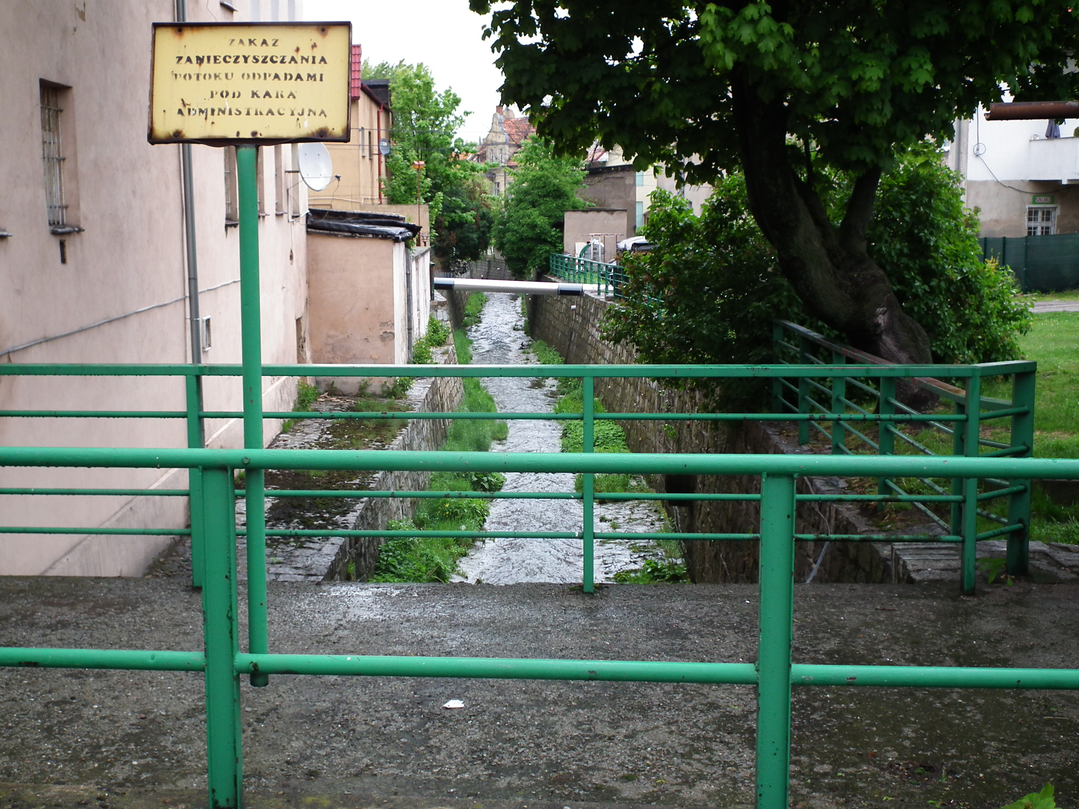 Potok Bielawica w Bielawie.